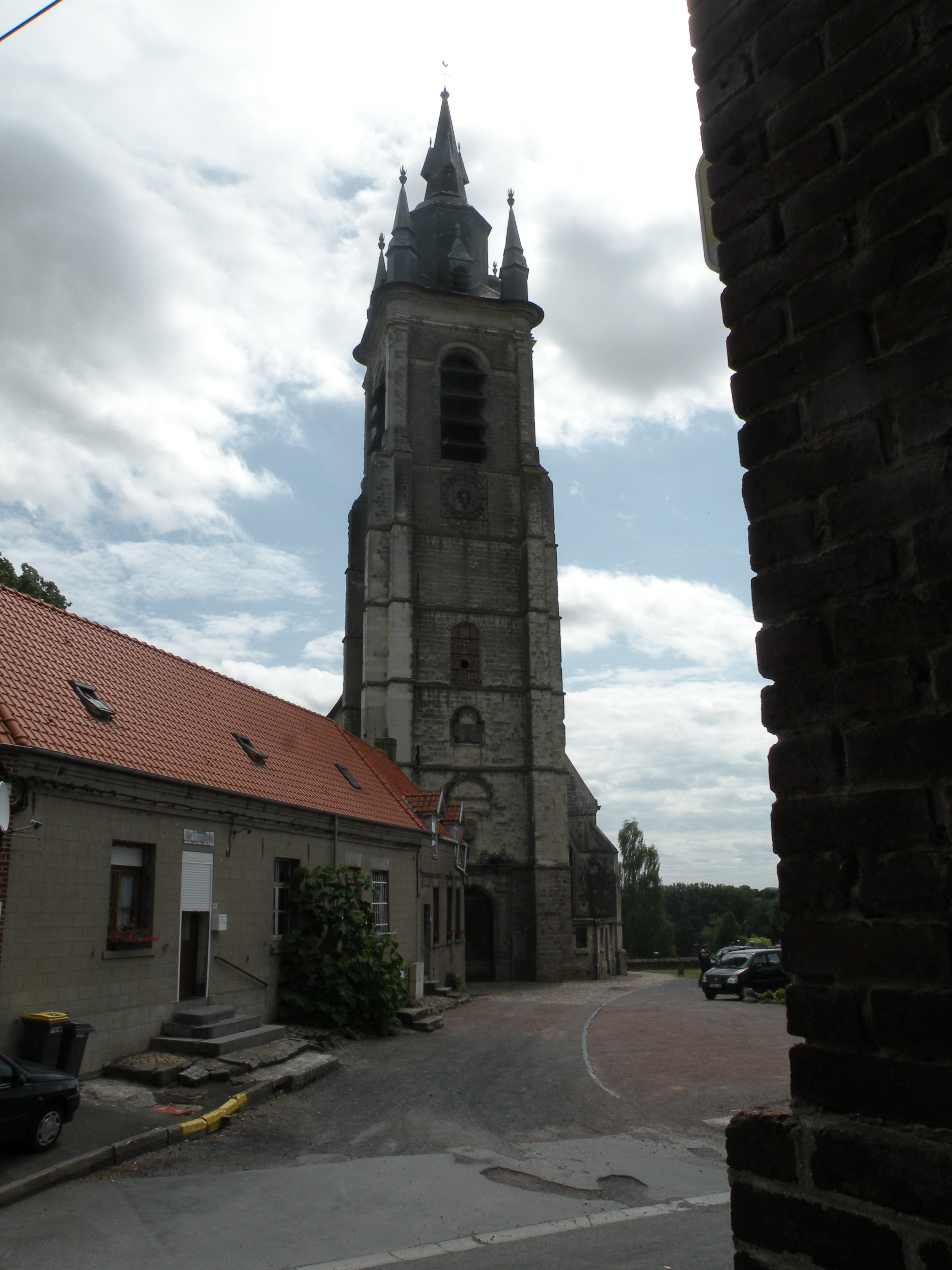 eglise st druon de Sebourg